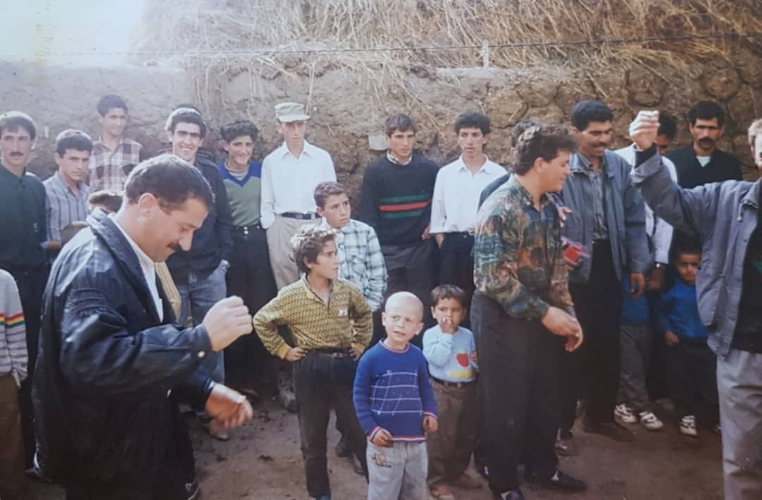 مراسم عروسی در خان کندی تولون